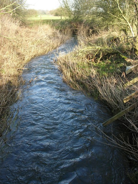 River Tove